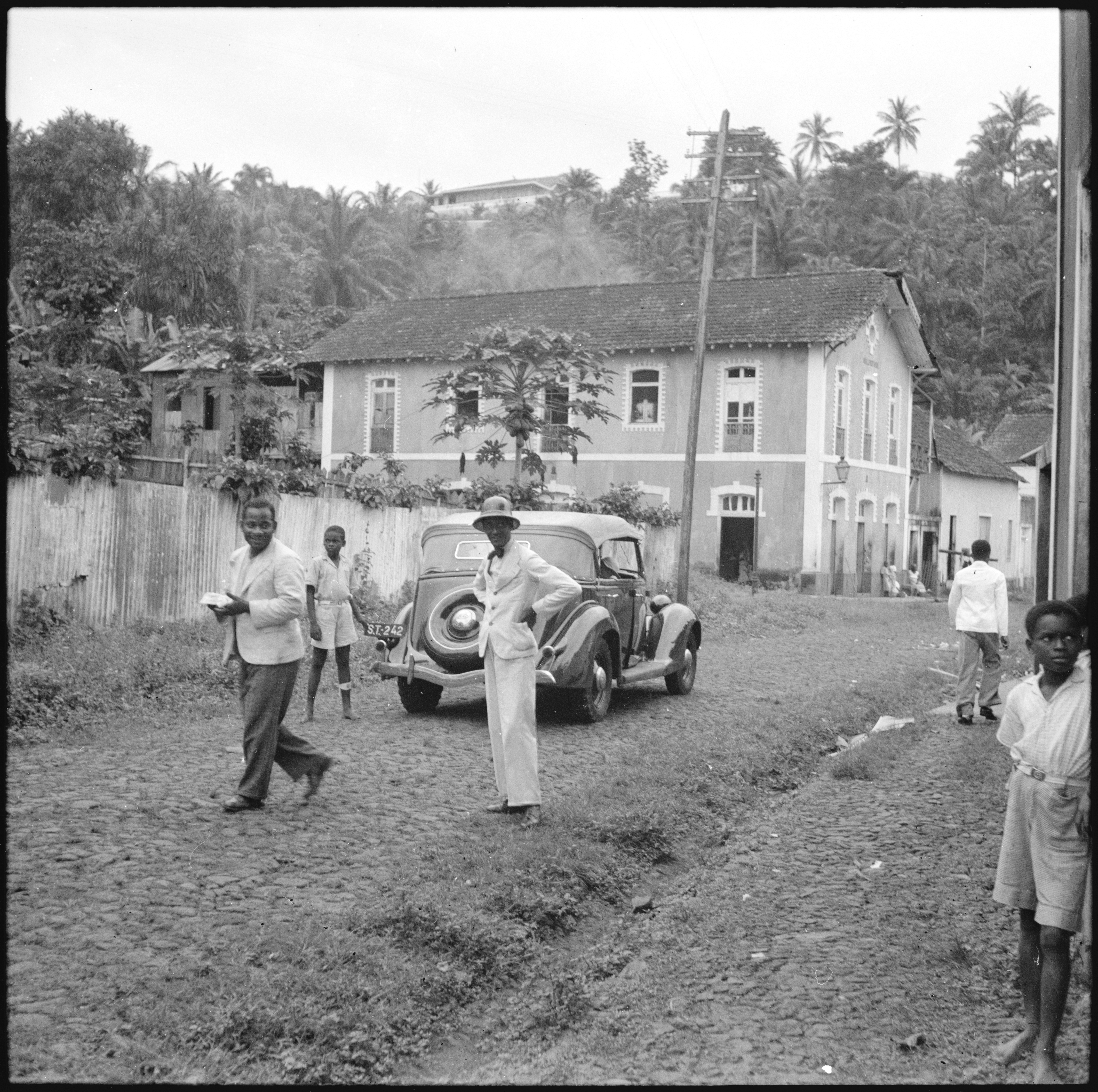 Portugal, San Thomé (São Tomé und Príncipe): Strassenszene; Automobil umgeben von Menschen